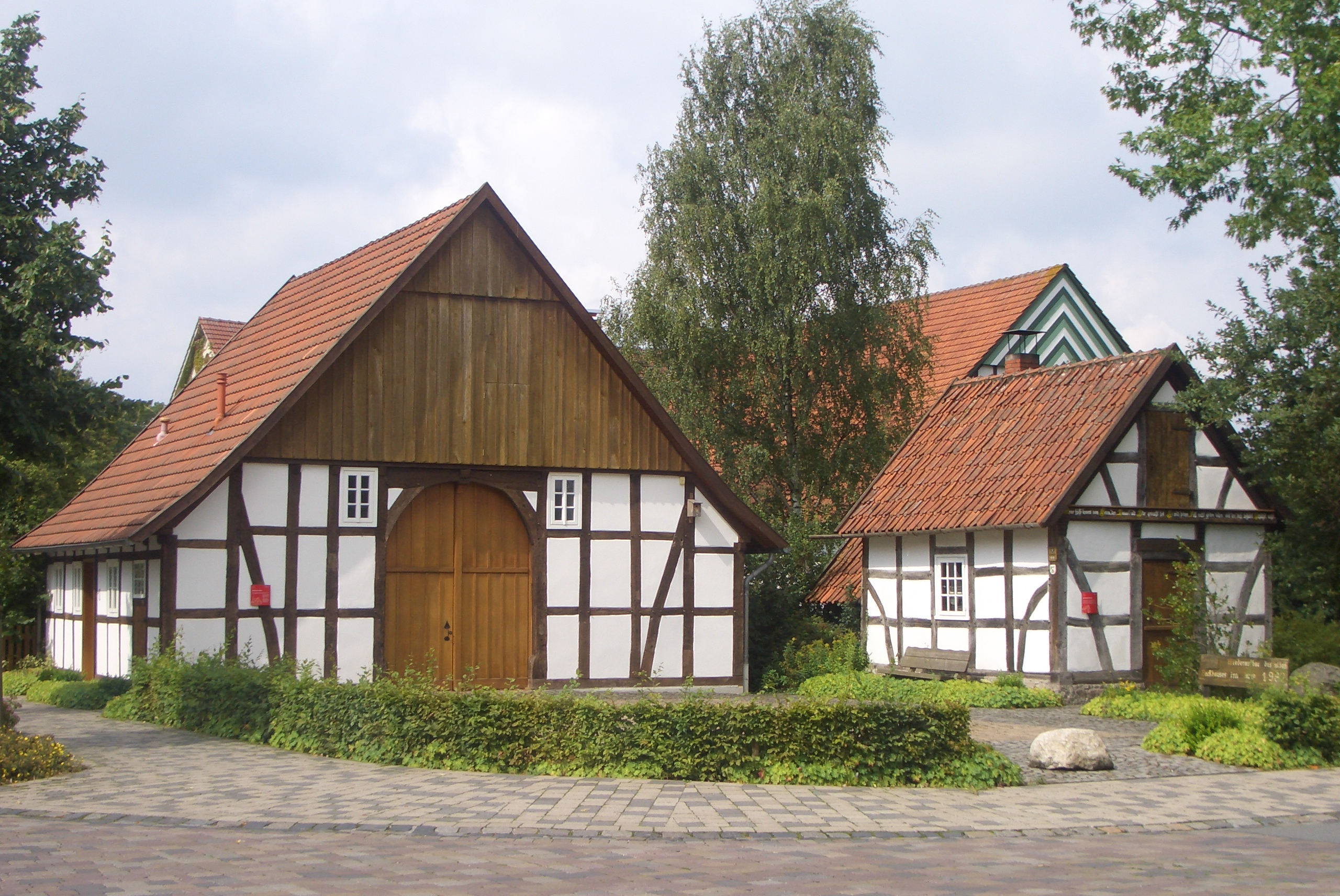 Dorfgemeinschaftshaus und Backhaus